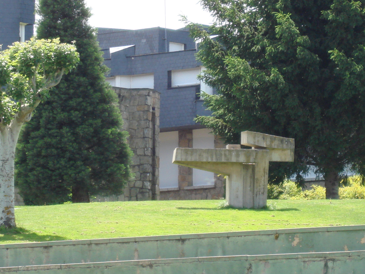 En el interior de las instalaciones del Centro de Estudios "Santa María del Castillo" pueden encontrarse dos esculturas del genial artista Jorge Oteiza, así como los fustes de tres antiguas cruces de piedra, que formaban parte de un antiguo calvario.